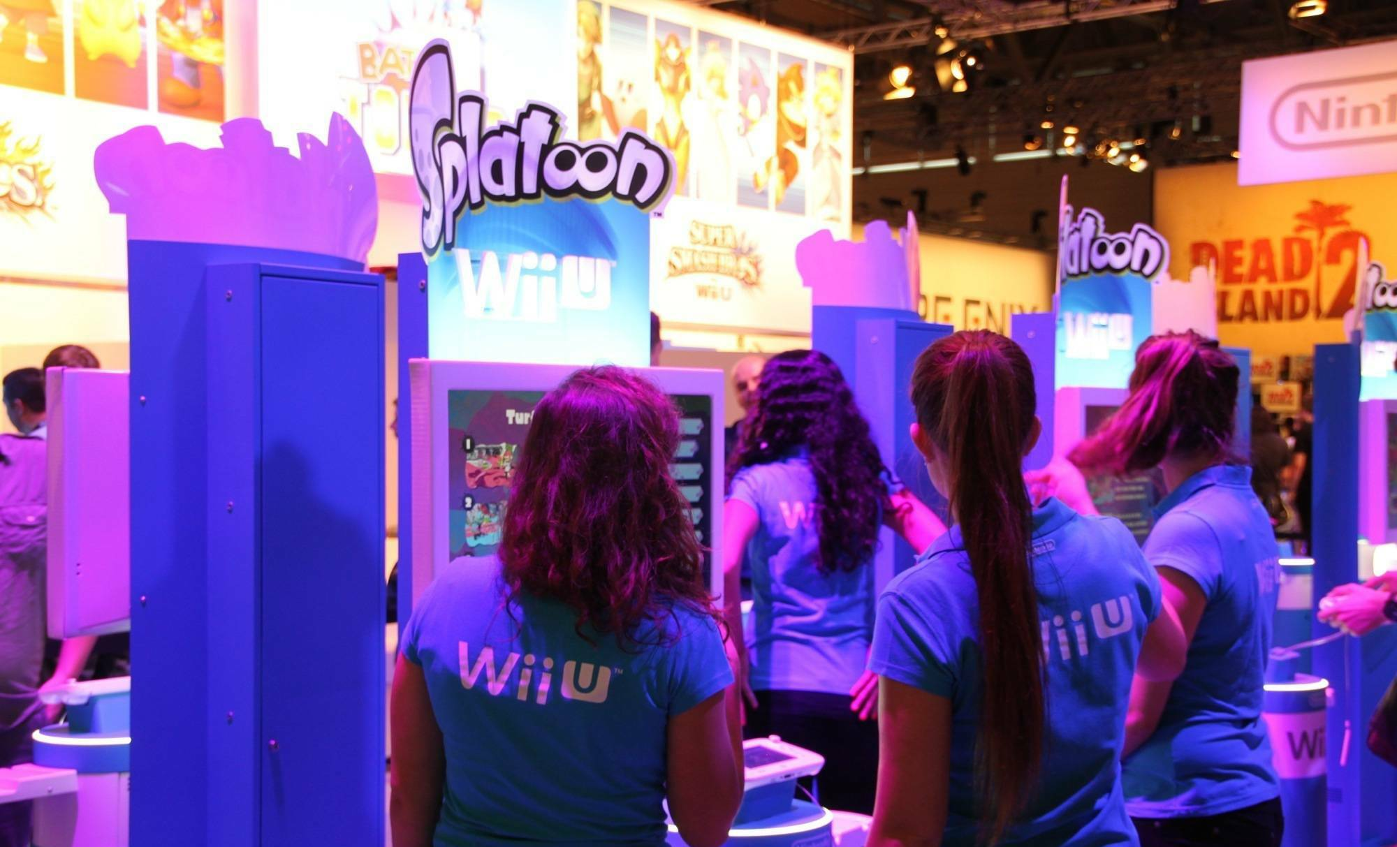 Impressionen: Erster Tag, Mittwoch. Mehr auf